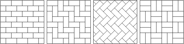 Legverbanden